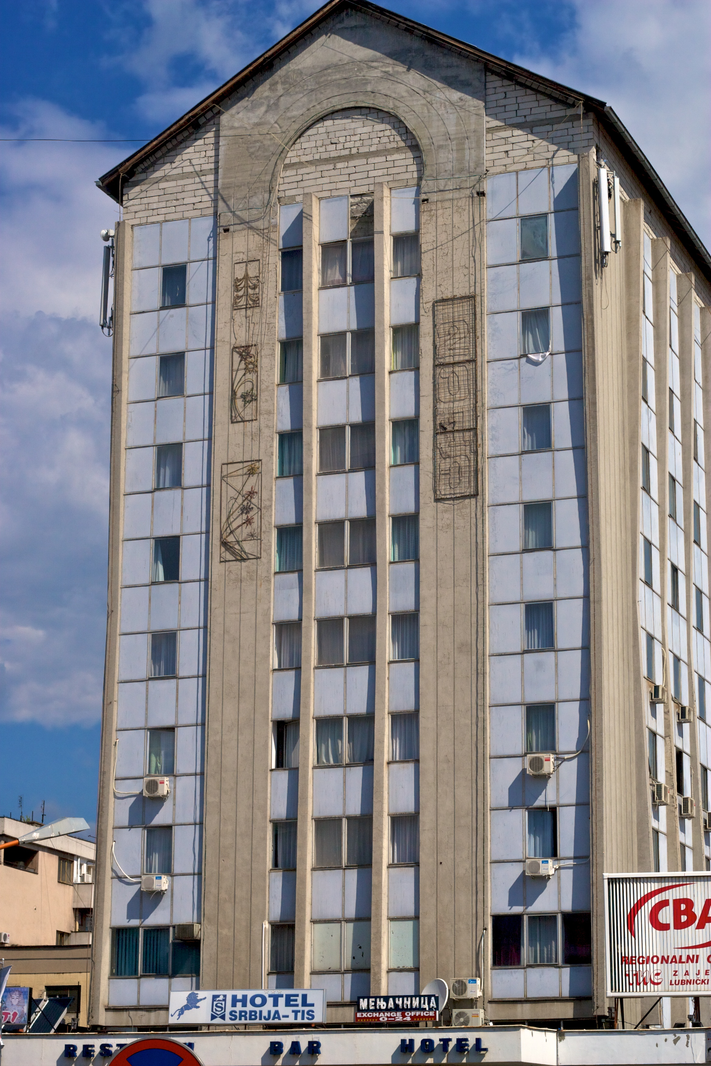 Srbija Tis Hotel, Zaječar